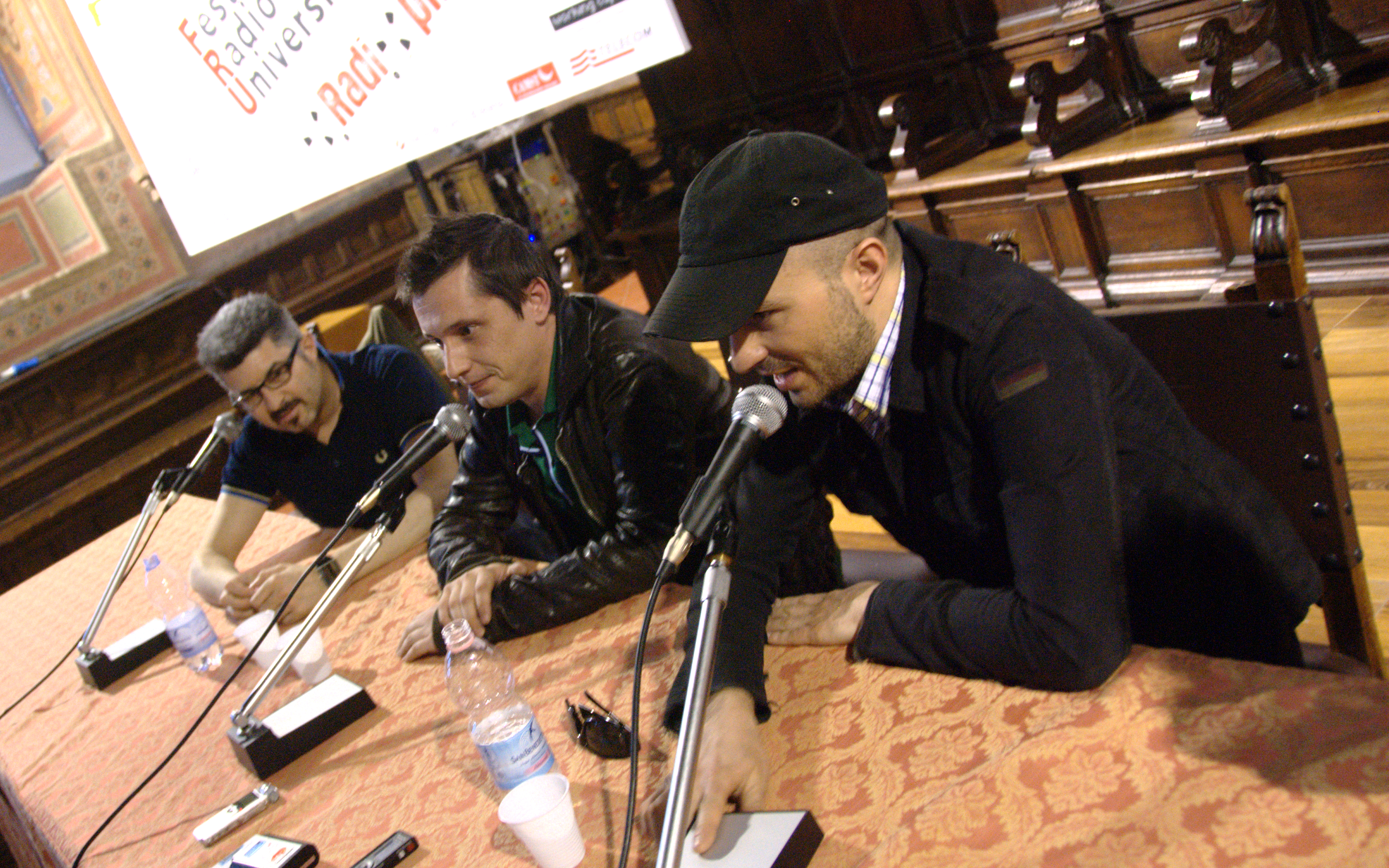 Conferenza stampa dei Motel Connection al FRU 2010 di Perugia.